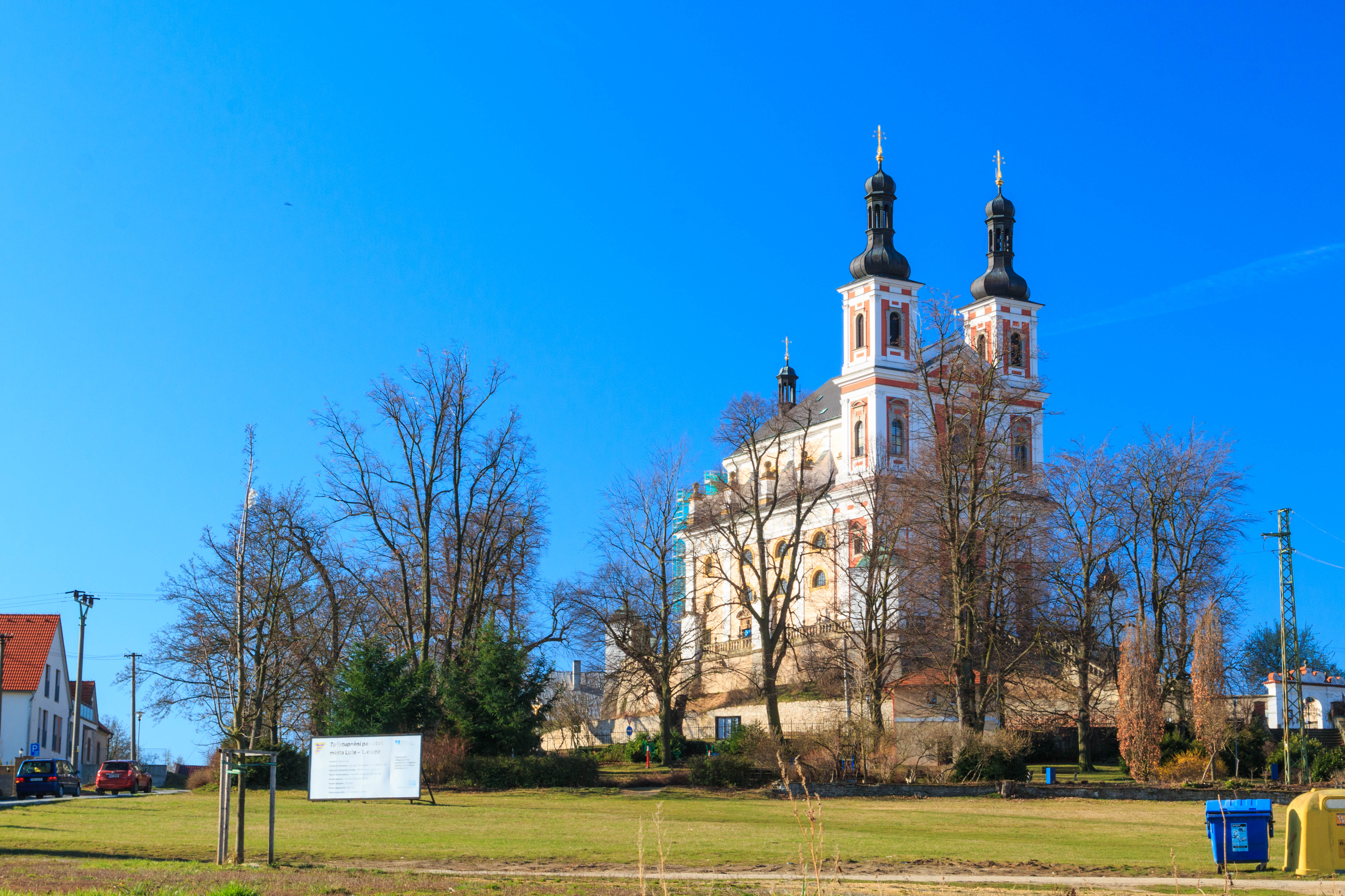 Kostel Panny Marie na Chlumku, Hamzova, Luže, Luže.